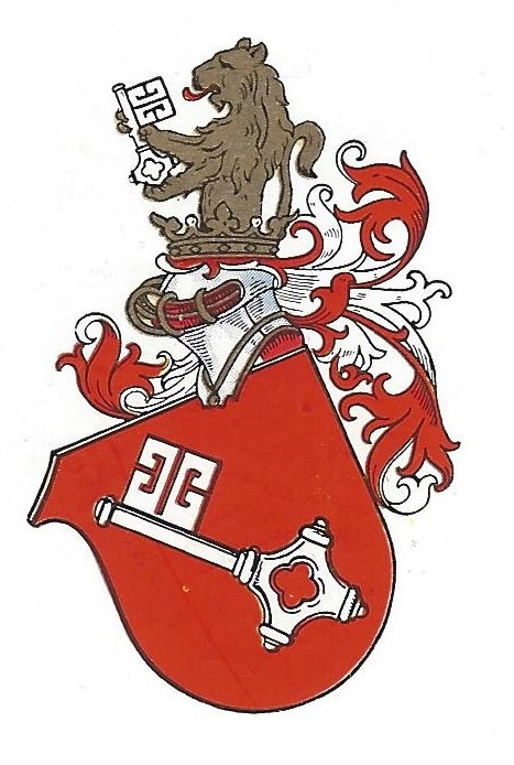 Wappen der Bremer Gesellschaft zu Freiburg im Breisgau